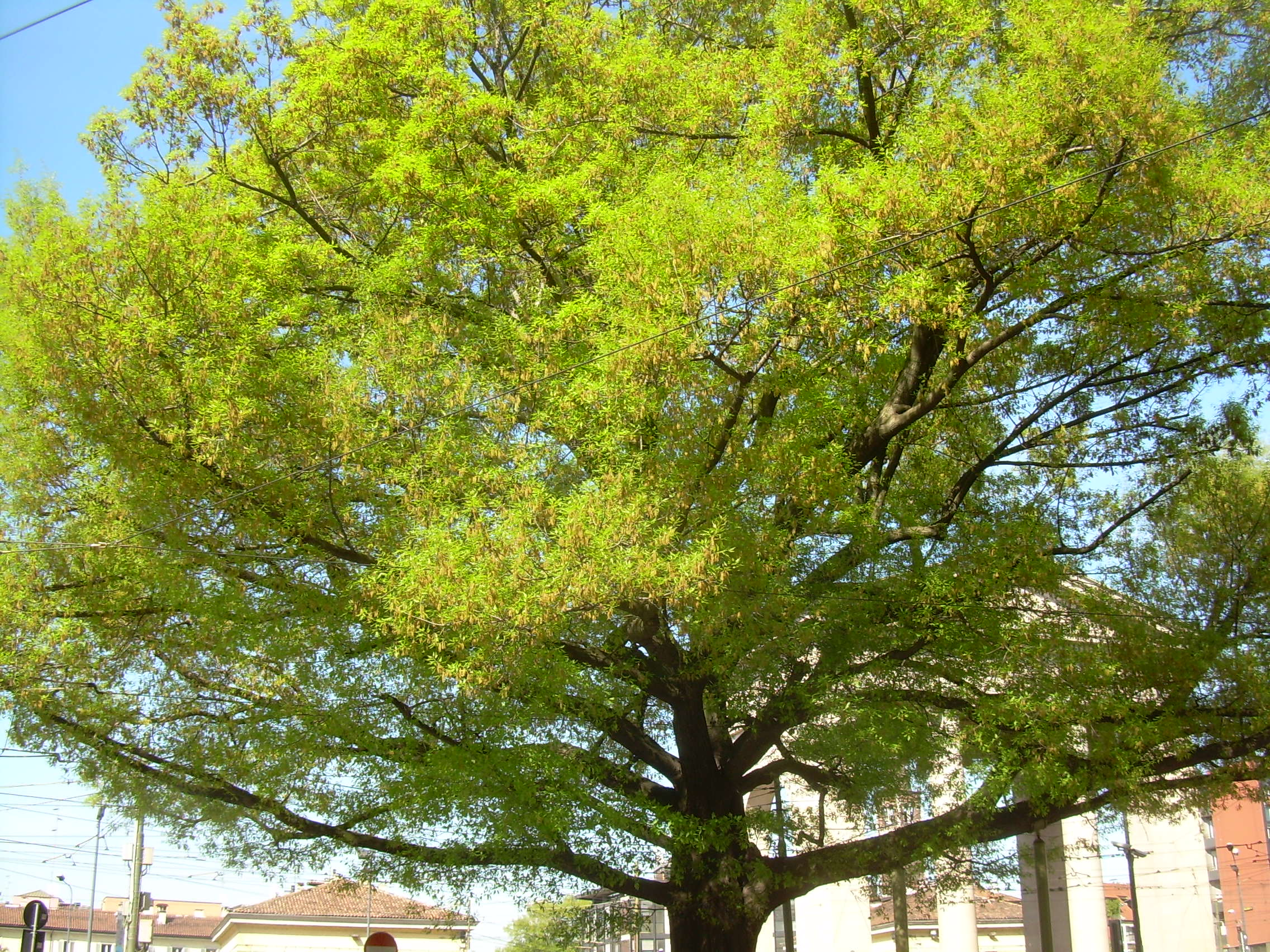 La quercia di piazza XXIV maggio a Milano, vista da corso San Gottardo.